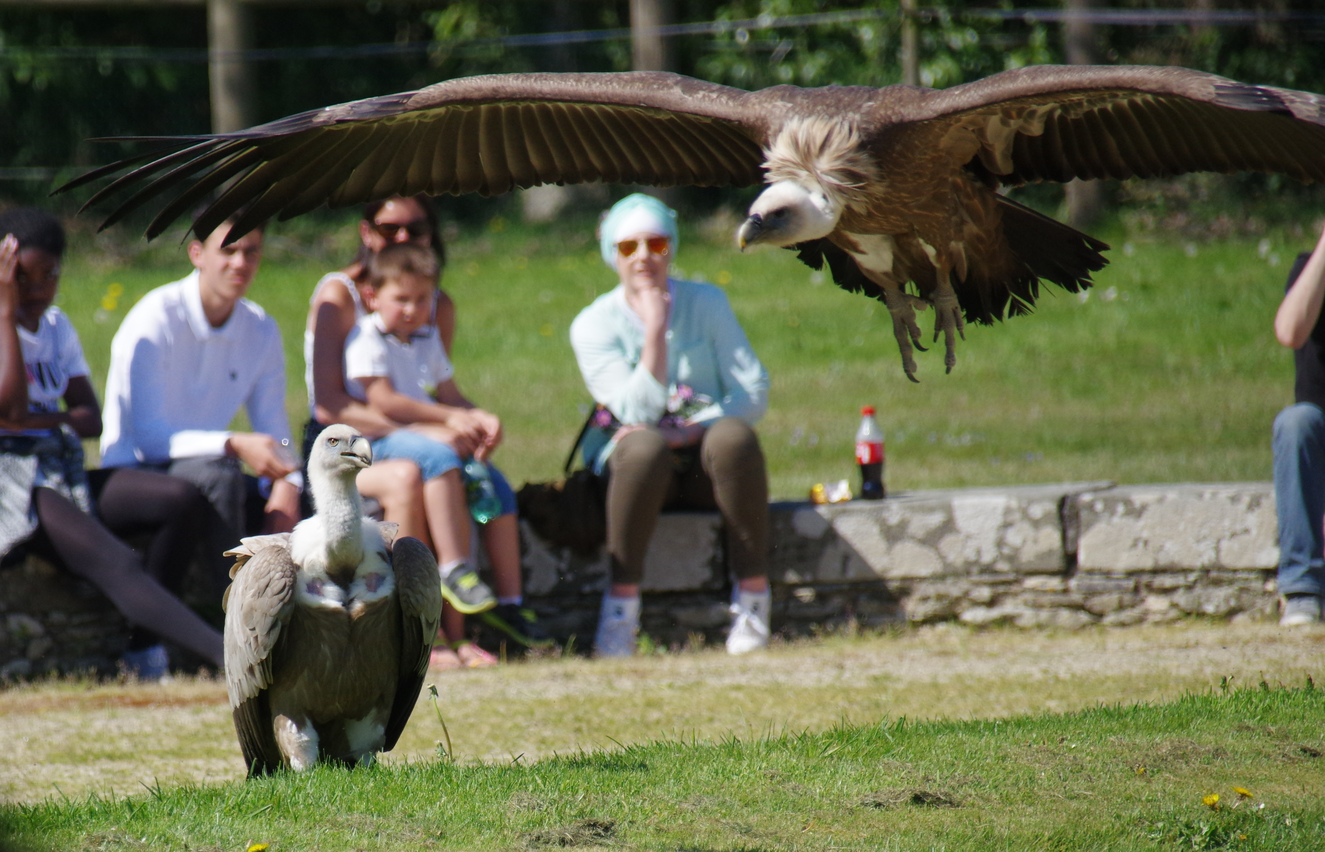 Vautours fauves (Gyps fulvus) pendant le spectacle de fauconnerie du zoo de La Bourbansais.